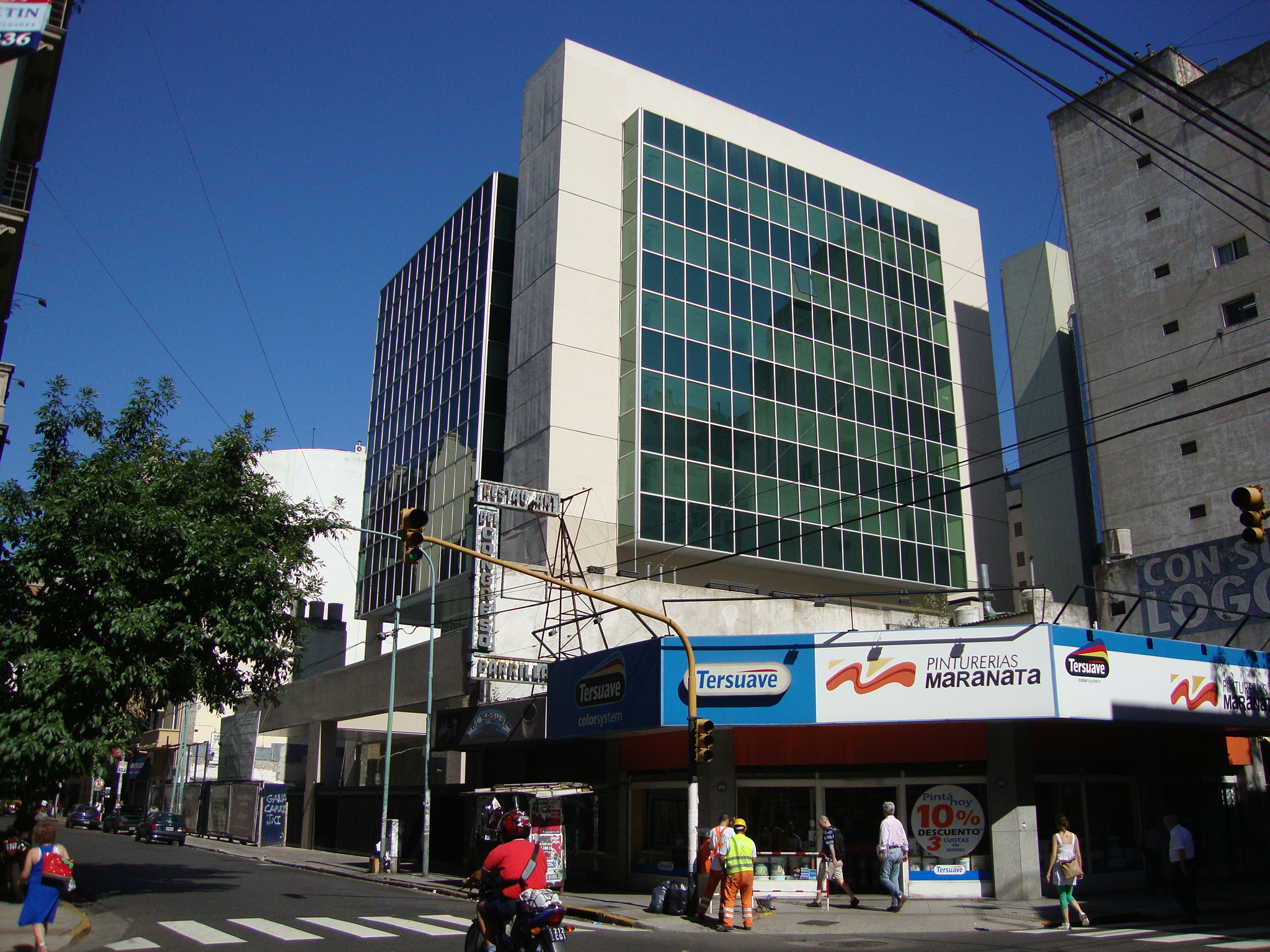 Anexo "C" de la Cámara de Diputados del Congreso de la Nación Argentina, visto desde la calle Bartolomé Mitre.